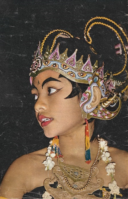 Photo de Jean-Maurice et Françoise parue dans JOUR DE FRANCE en Février 1962. 1er prix Palmarès du challenge mondial de la couleur Air-France / Kodak-Pathé / JOUR DE FRANCE de 1961